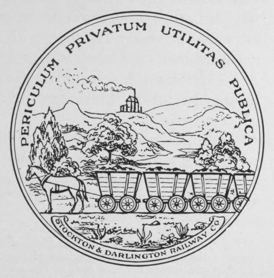 Stockton and Darlington seal